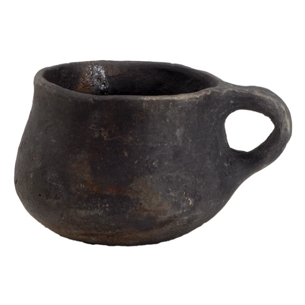 Profilo sinuoso. Orlo arrotondato estroflesso. Fondo convesso. Ansa a nastro impostata all'orlo e in corrispondenza del punto di massima espansione. Superficie di color bruno scuro.